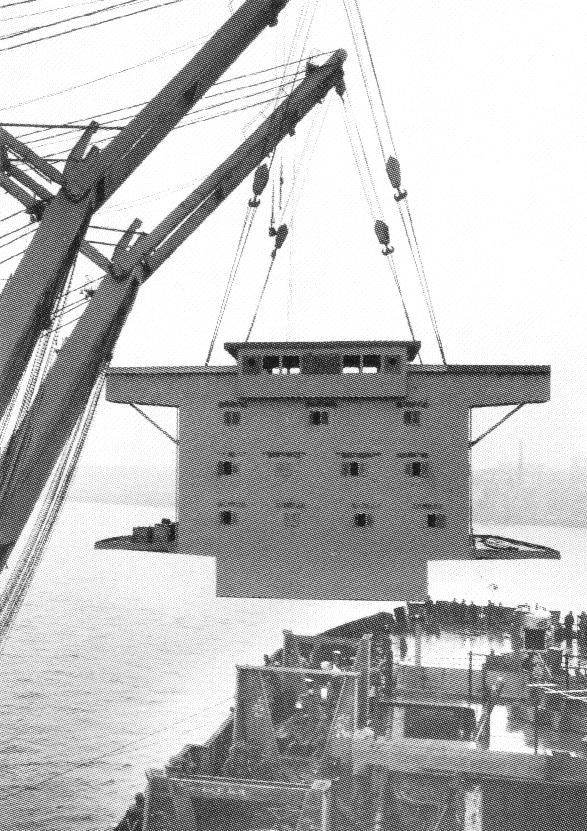 Deckshaus des Frachtschiffs Pioneer von Blohm+Voss in Hamburg. Design: Arno Votteler 1967.